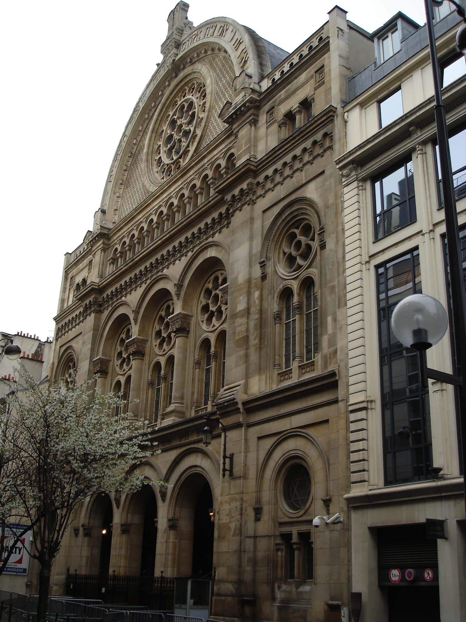 Grande synagogue de la Victoire à Paris- la façade